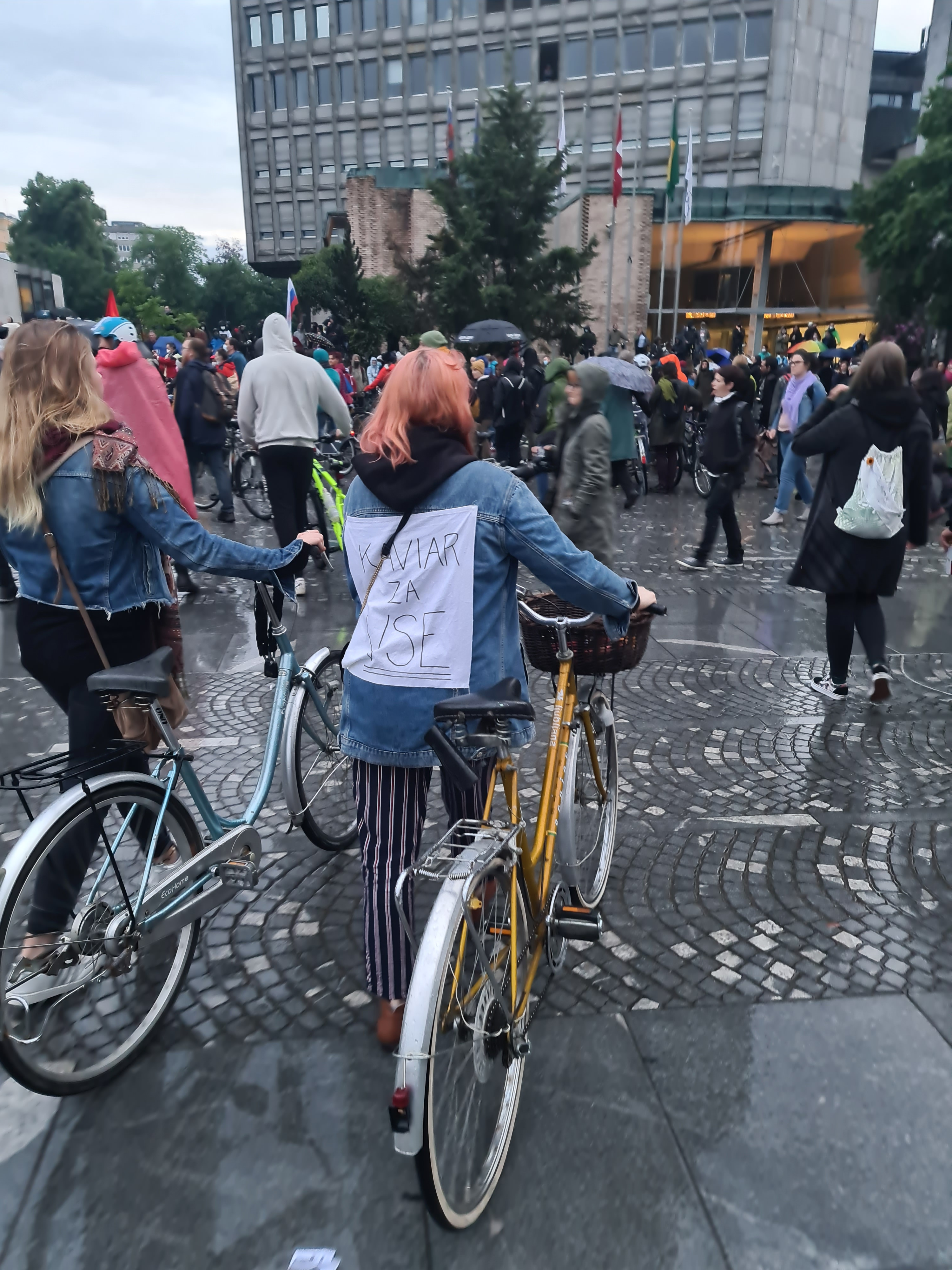 Kolesarski protest 15. maja v Ljubljani.